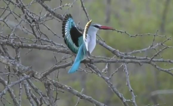 שלדג העצים מציג את כנפיו